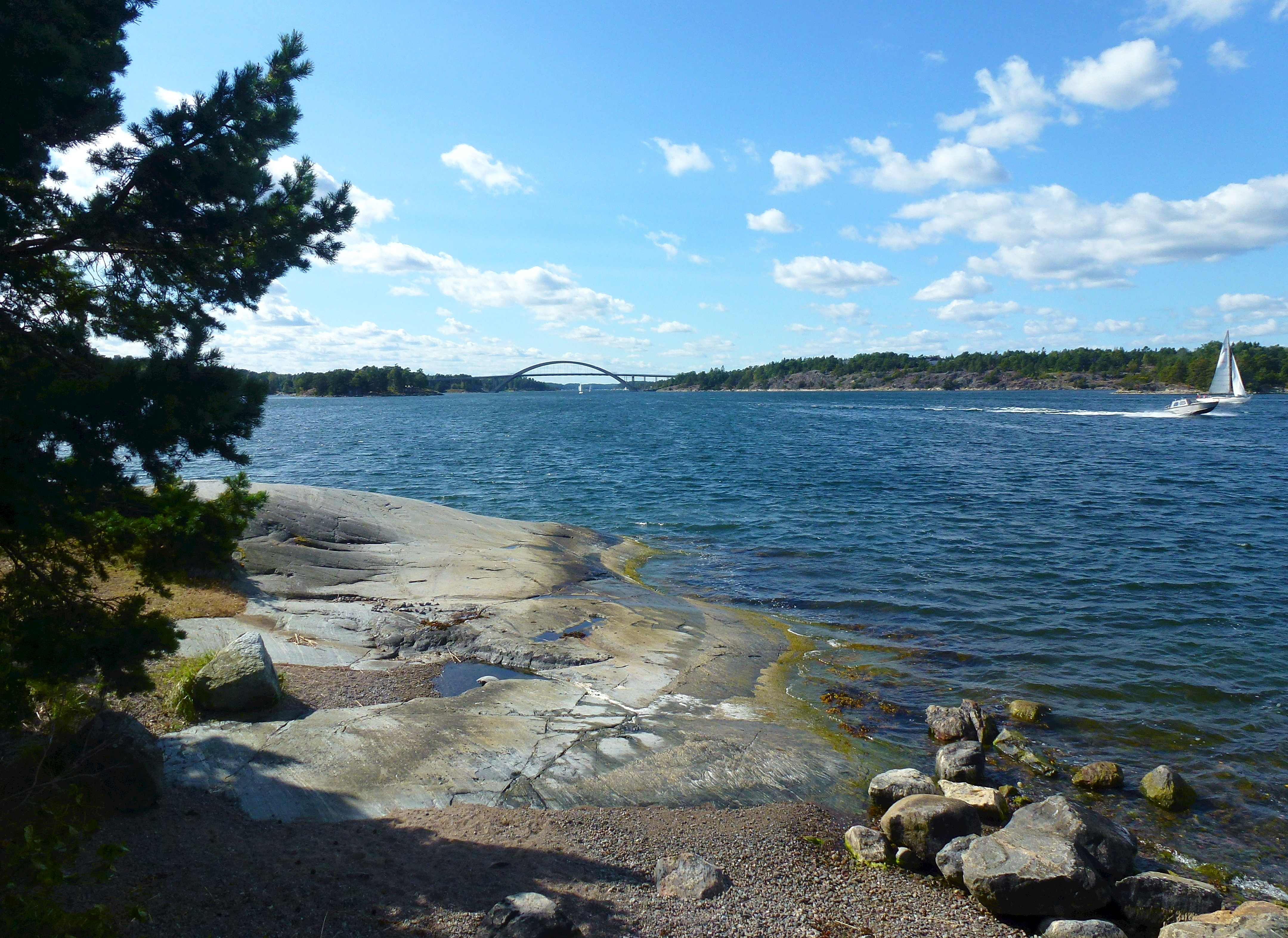 Breviken med Djuröbron i bakgrunden